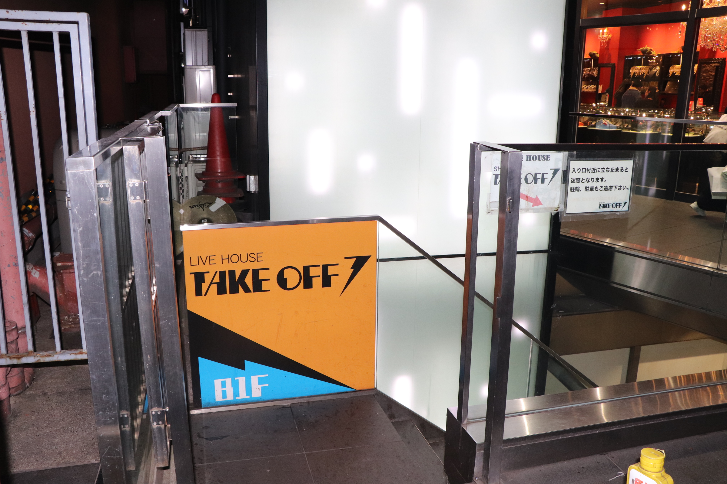 TAKEOFF7